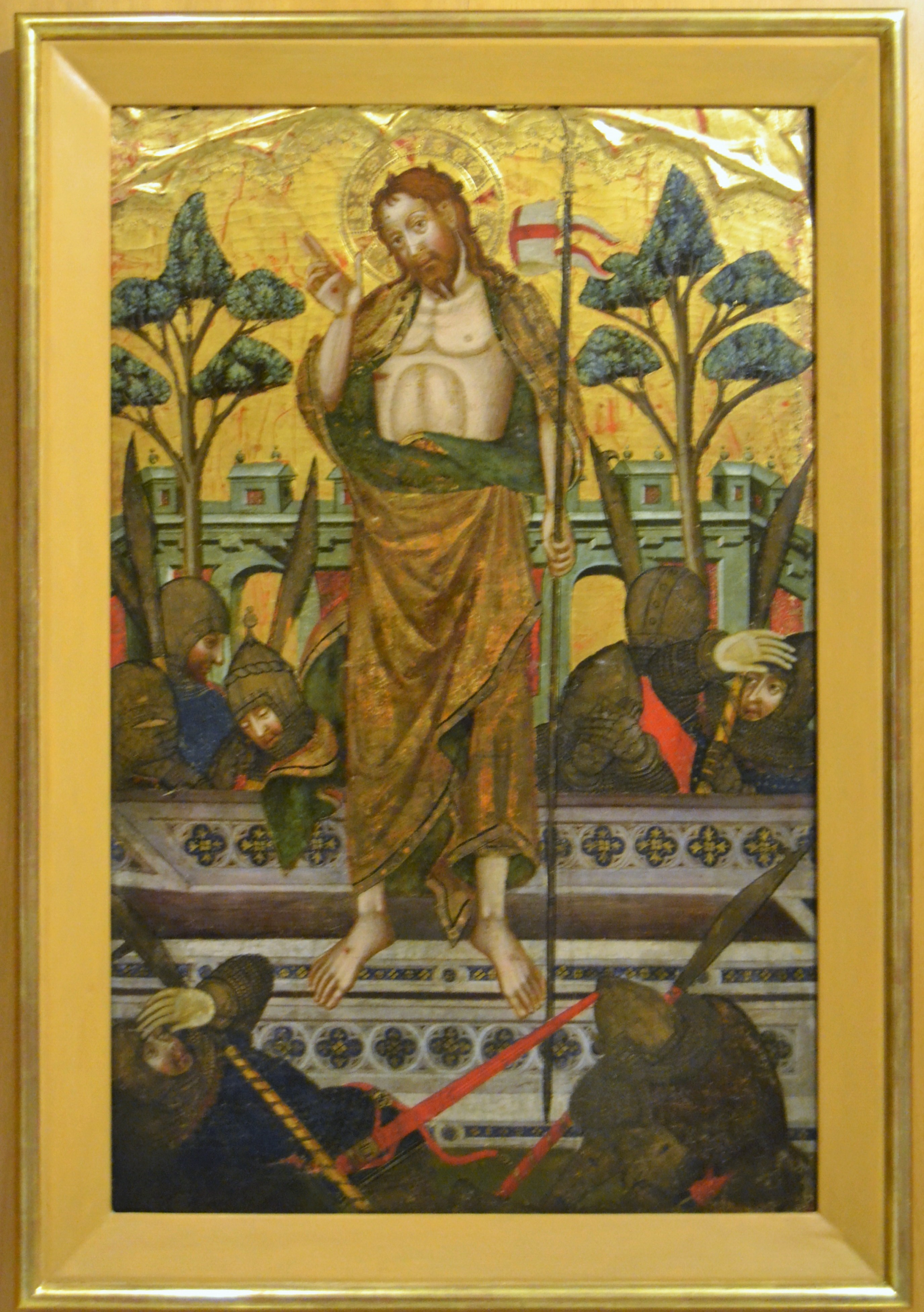 Resurrecció de Crist, Llorenç Saragossà (documentat a Barcelona i València entre 1363 i 1406). Oli sobre fusta. Donació Orts-Bosch, museu de Belles Arts de València.